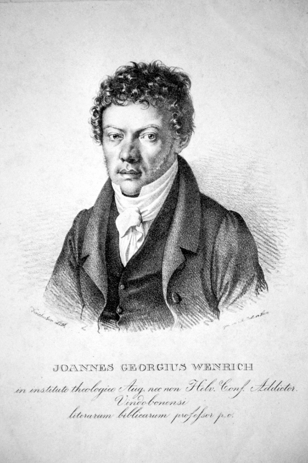 Johann Georg Wenrich (1787-1847), österreichischer Orientalist. Lithographie von Josef Kriehuber, um 1830